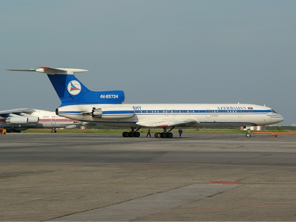 AZAL Tupolev Tu-154M